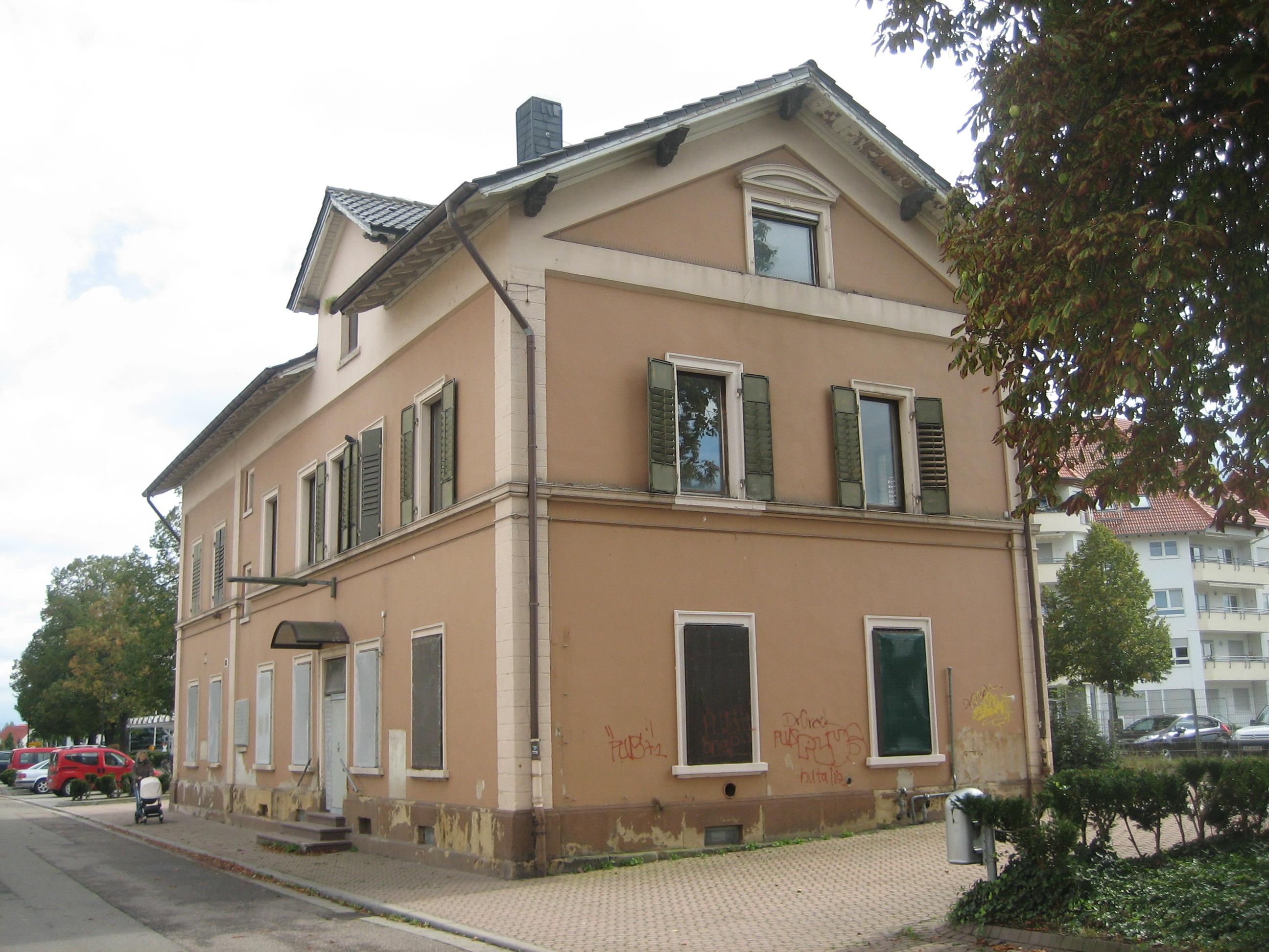 Bezeichnung: Bahnhof Lambsheim Lage: Bahnhofstraße 3 Ort: Lambsheim Bauzeit: 1877 Beschreibung: Bahnhofsgebäude; sandsteingegliederter Putzbau